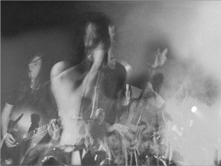 Offizielle Illustration der Philosophie Apokrypha's